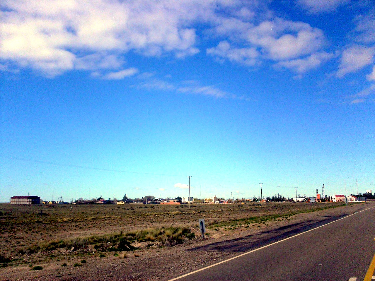 El poblado de Jaramillo desde la ruta